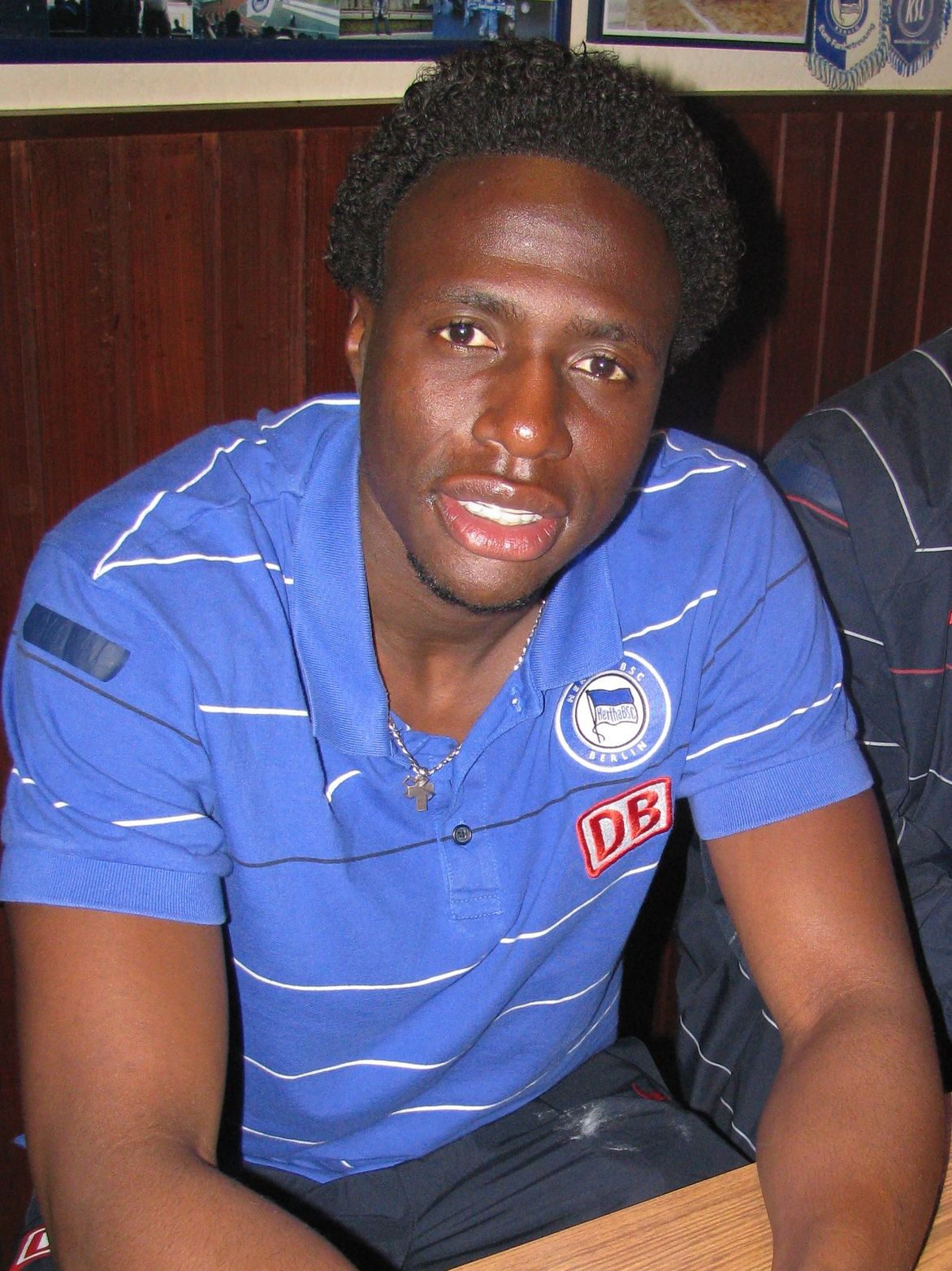 Rodnei beim Fantreff in der Zwitscher Klause